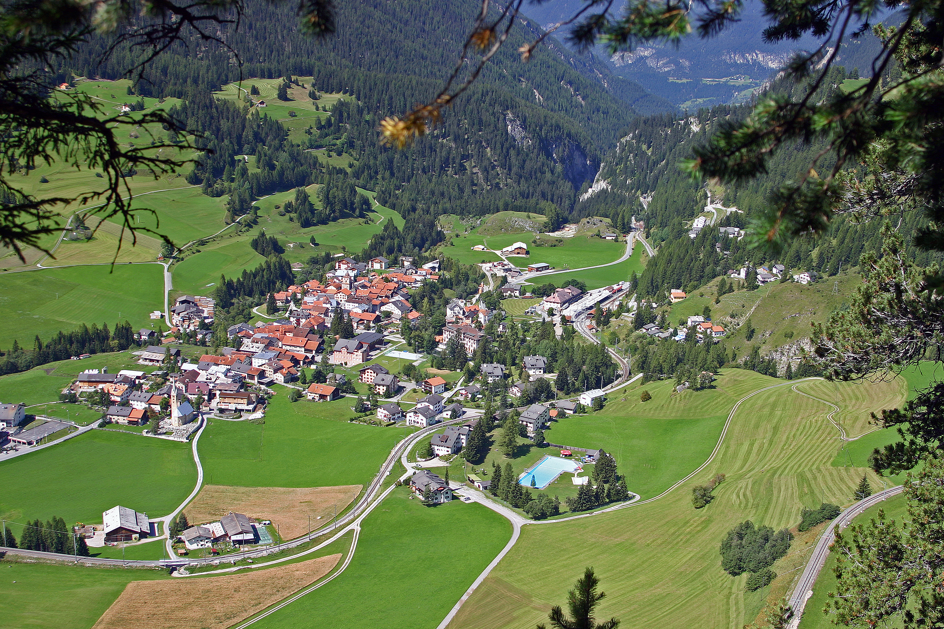 Bergün / Bravuogn aufgenommen vom Aussichtspunkt Crap Sot igls Munts (1664 m)